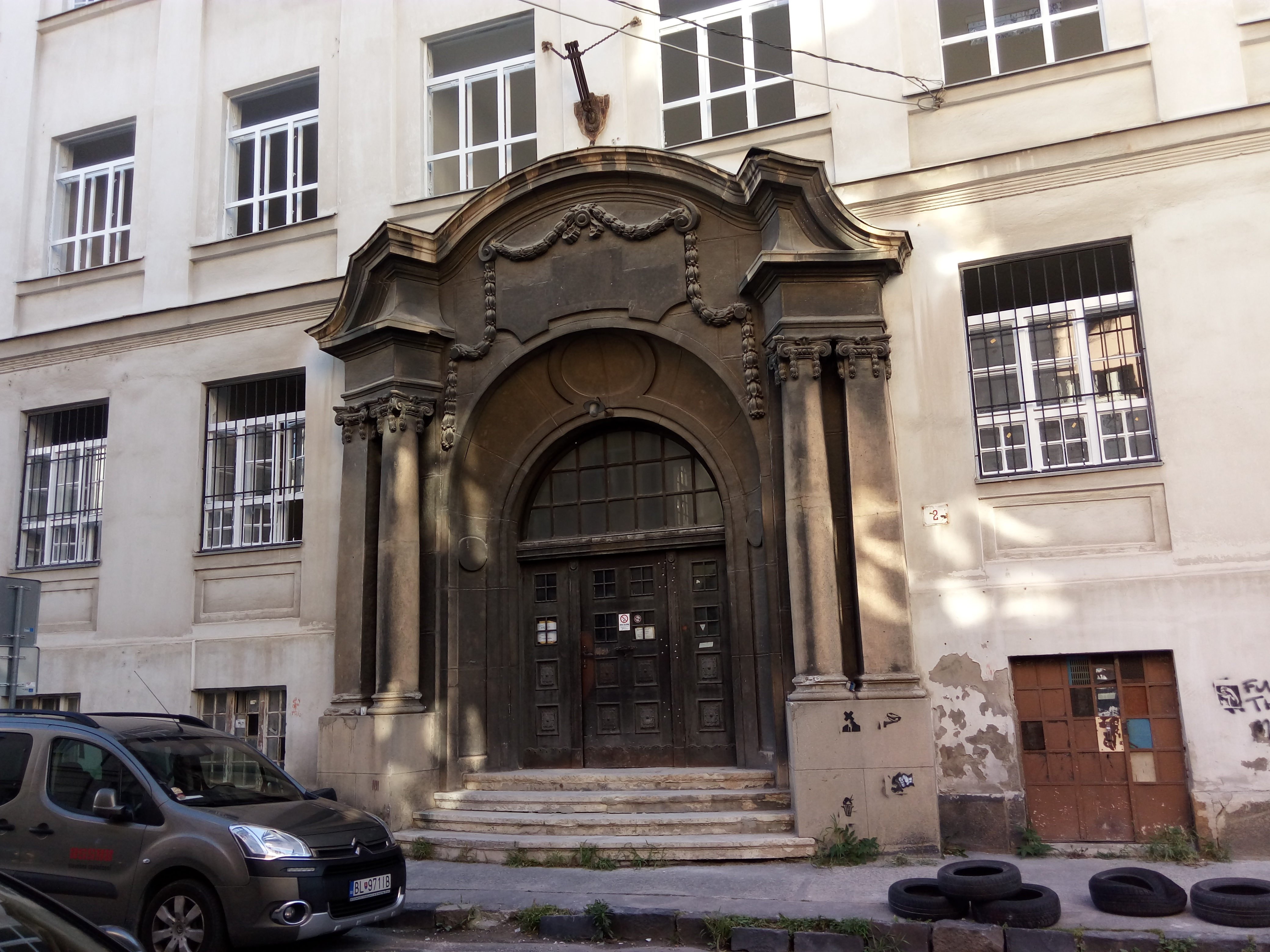 Moskovská 2, Staré Mesto, Bratislava